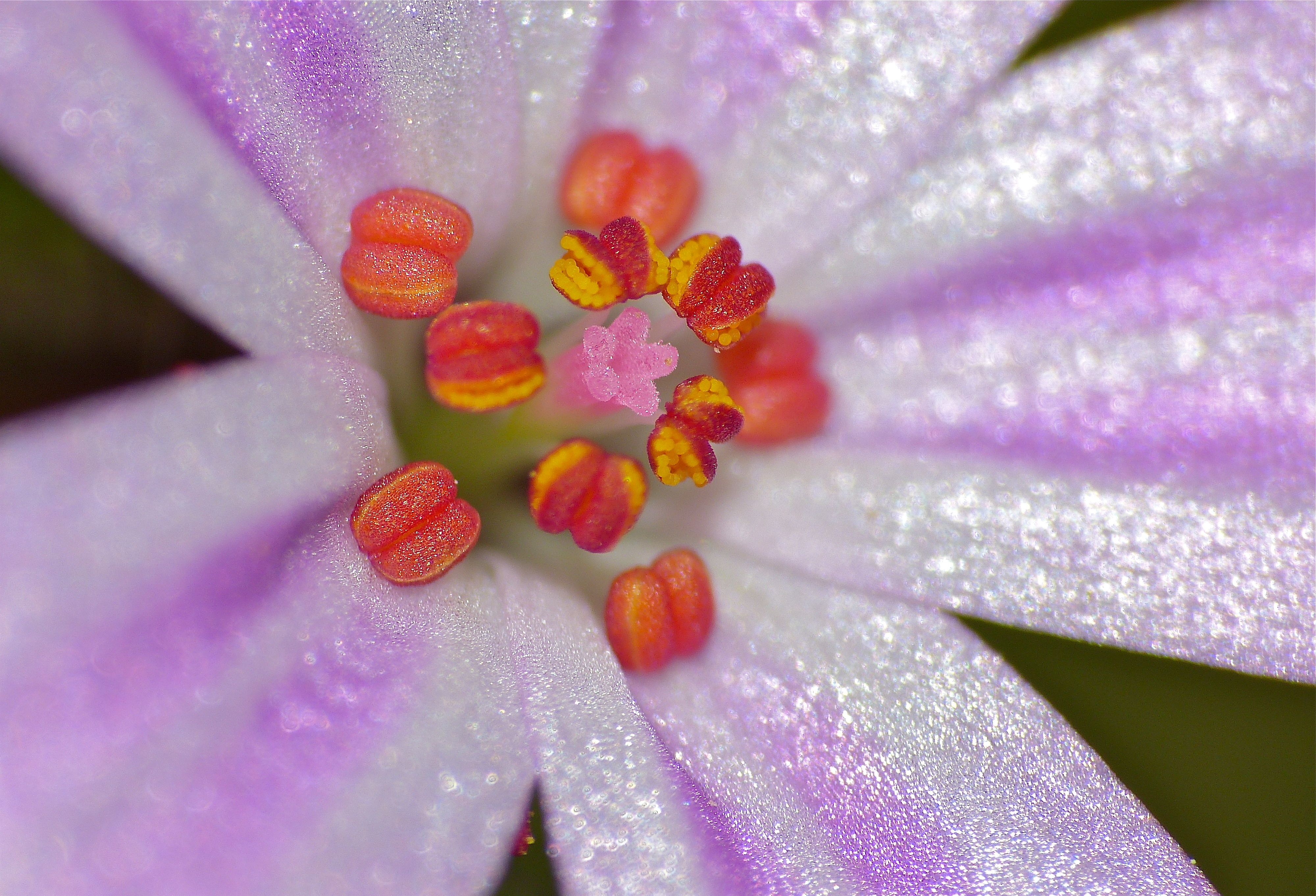 Col de l'OUillat, L'Albère, Pyrénées-Orientales